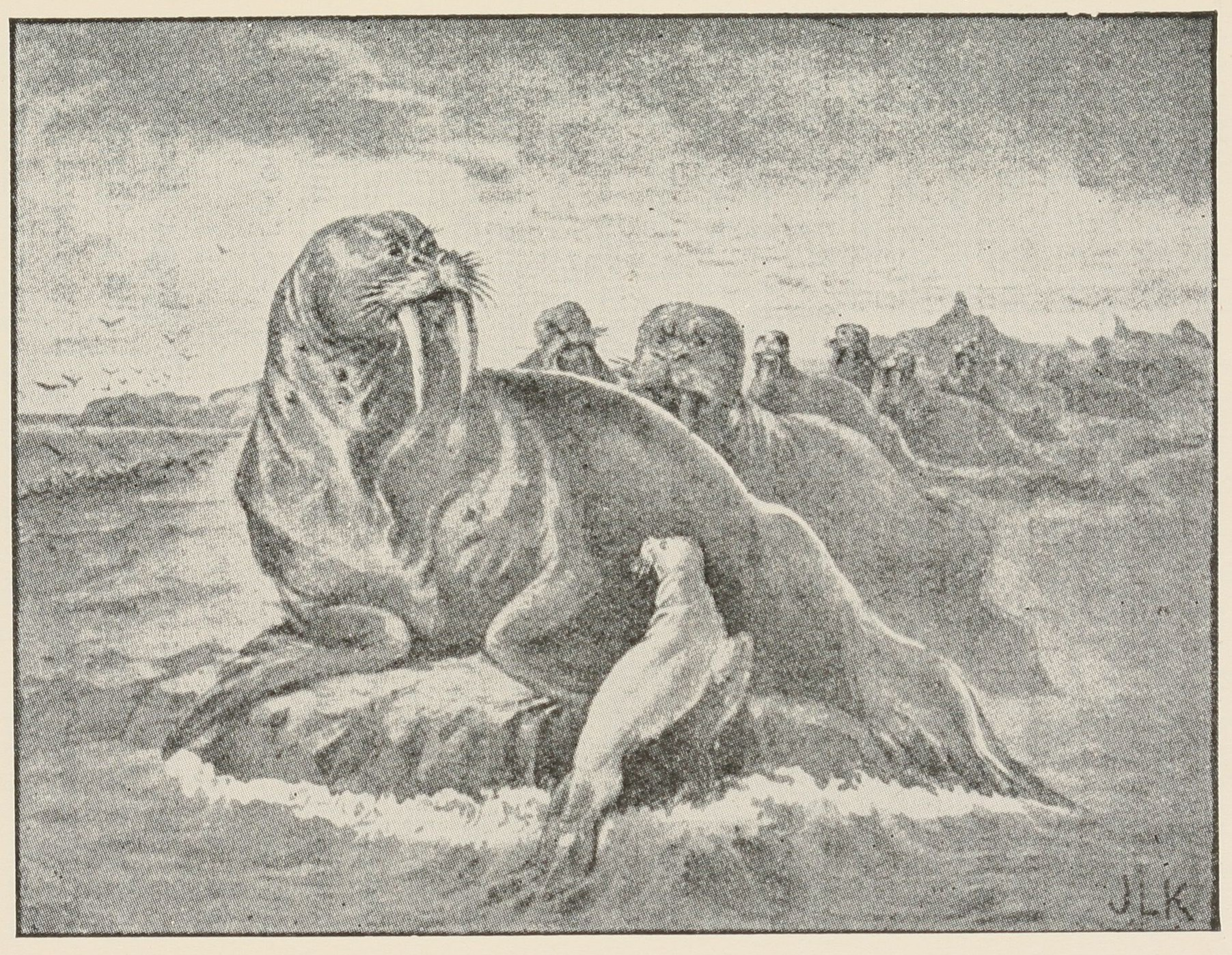 Illustration